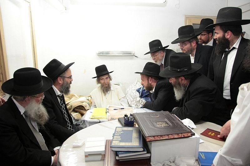 עסקני דגל התורה זליג אורלנסקי מנכ"ל יתד נאמן ועסקנים נוספים בהתייעצות במעונו של הרב שטיינמן